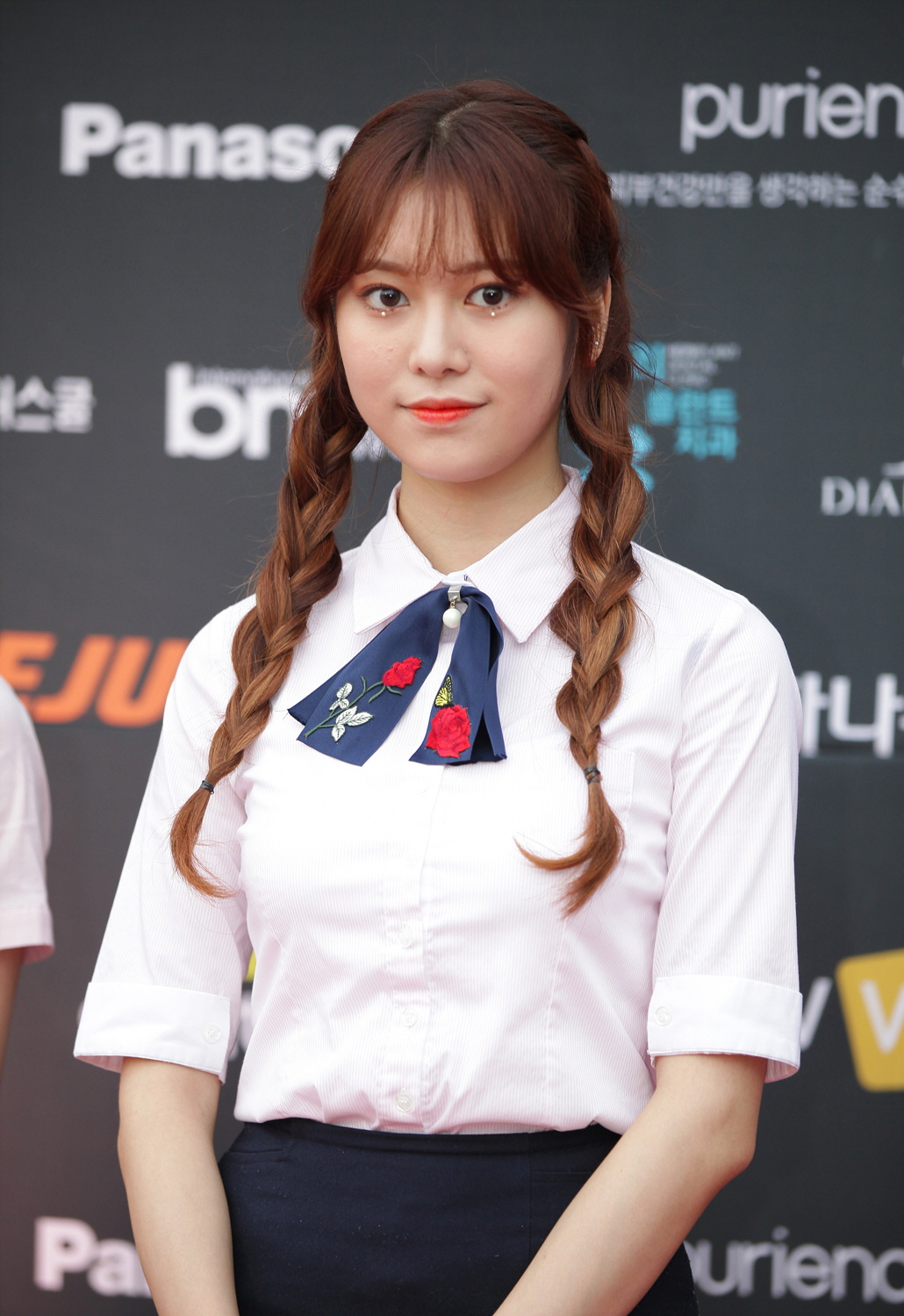 2017 아시아 모델 페스티벌 레드카펫